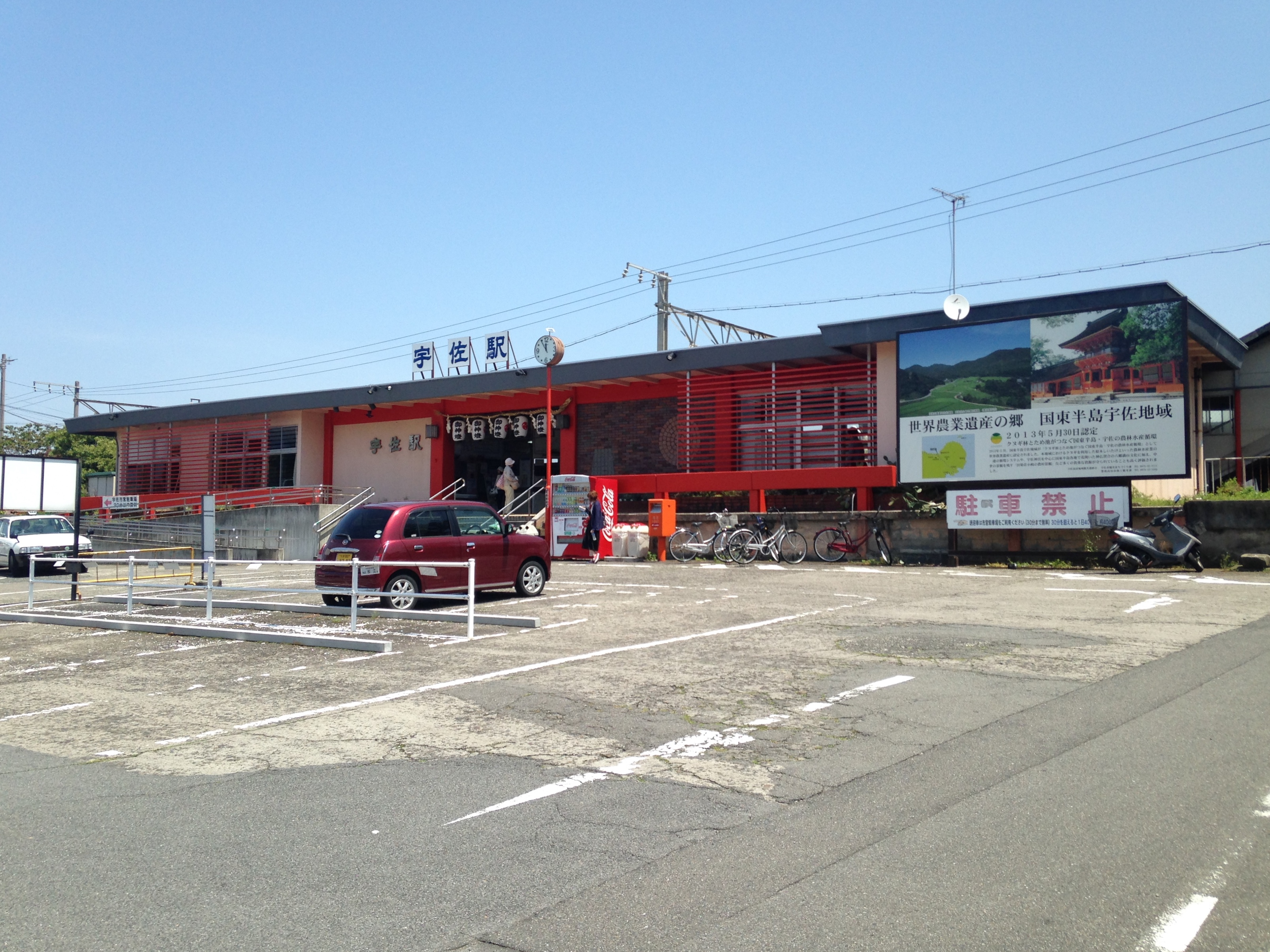 宇佐駅の駅舎